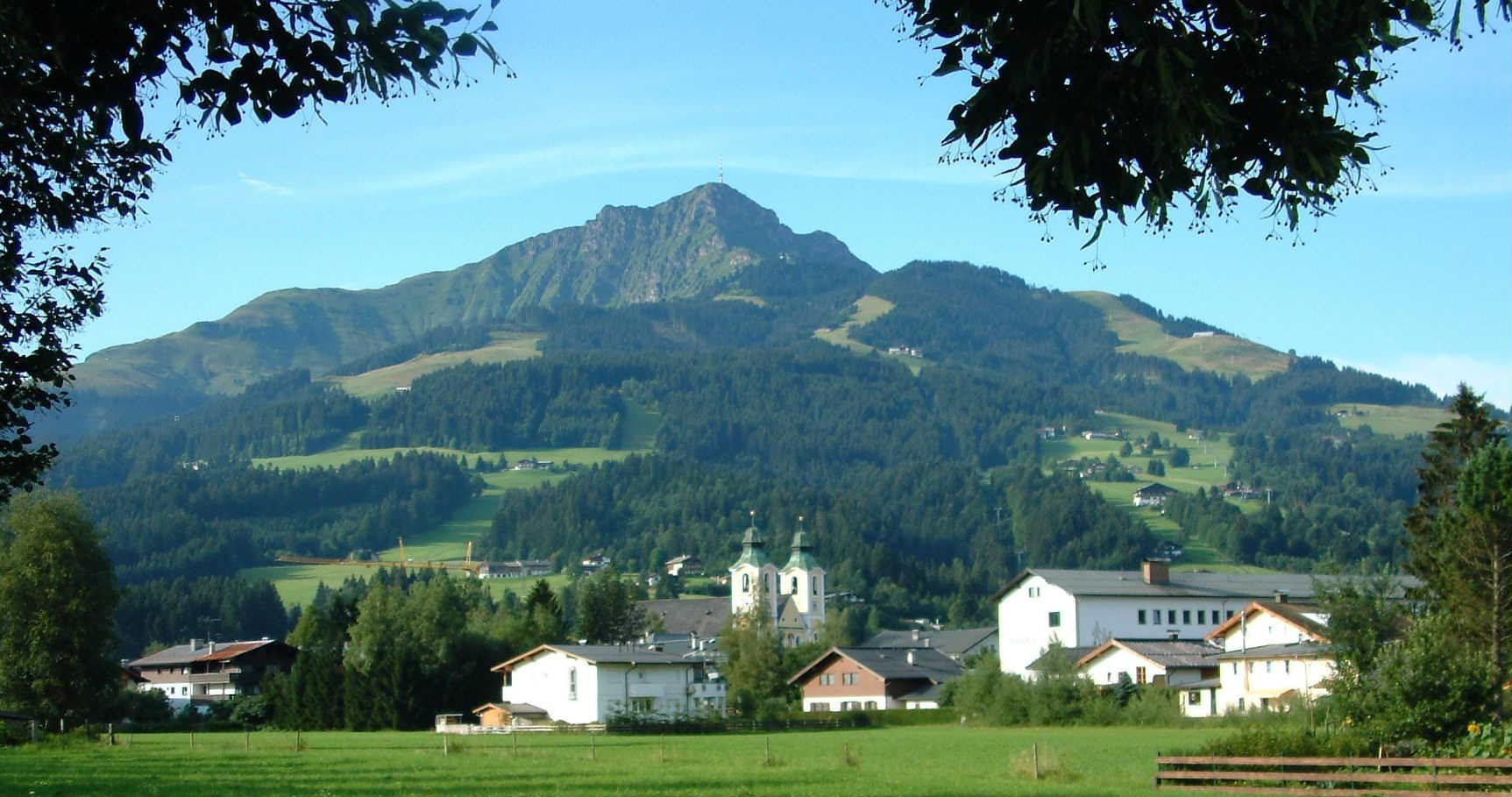 St. Johann mit Horn